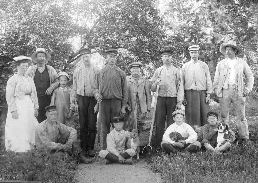 Lantarbetare på Lunds herrgård, Ösmo kommun